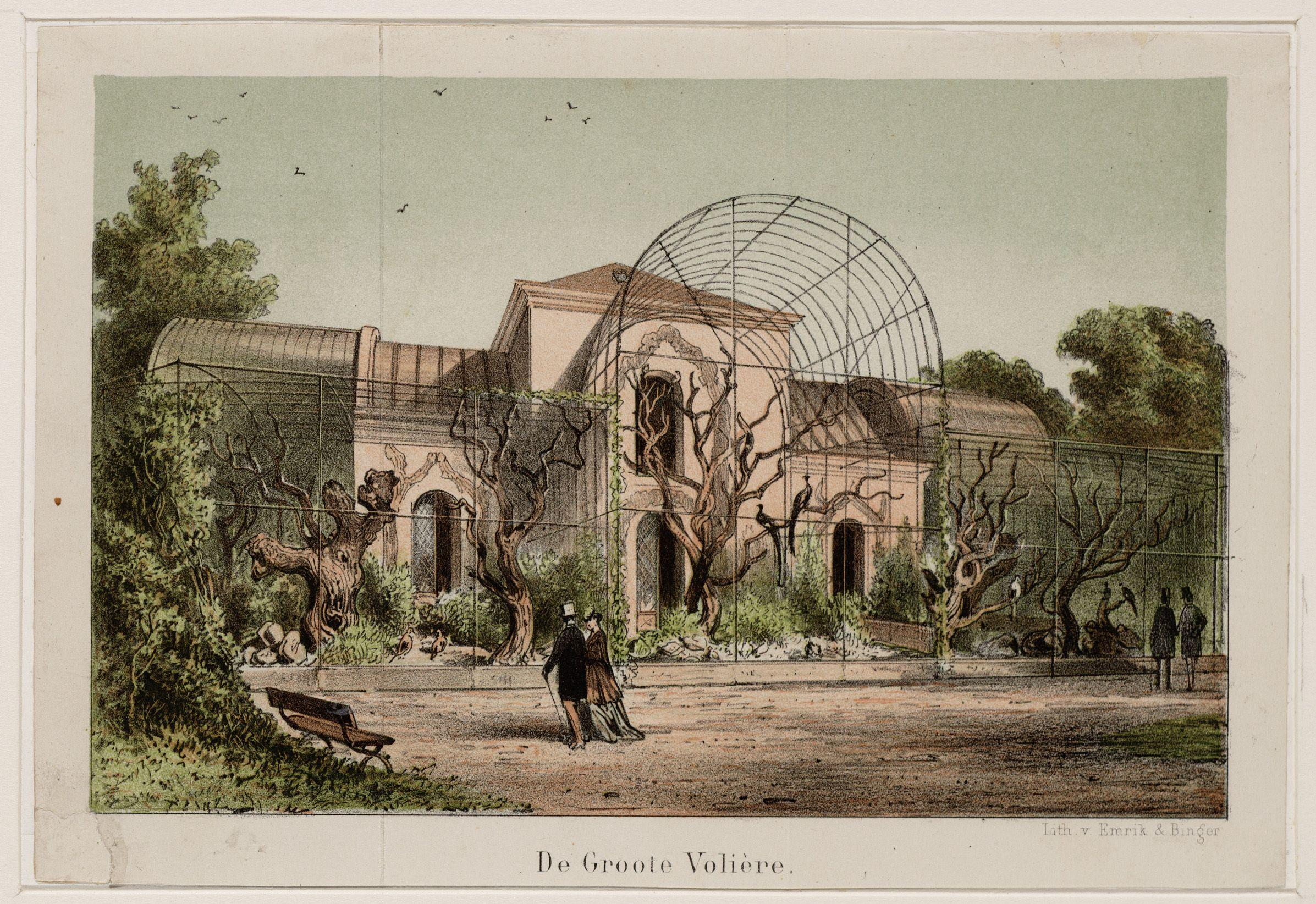 Beschrijving De Groote Volière Natura Artis Magistra, grote volière. Afmetingen: 116x177 mm. Documenttype prent Vervaardiger Emrik en Binger Collectie Collectie Stadsarchief Amsterdam: tekeningen en prenten Datering 1875 ca. t/m 1900 Inventarissen Afbeeldingsbestand 010097004123